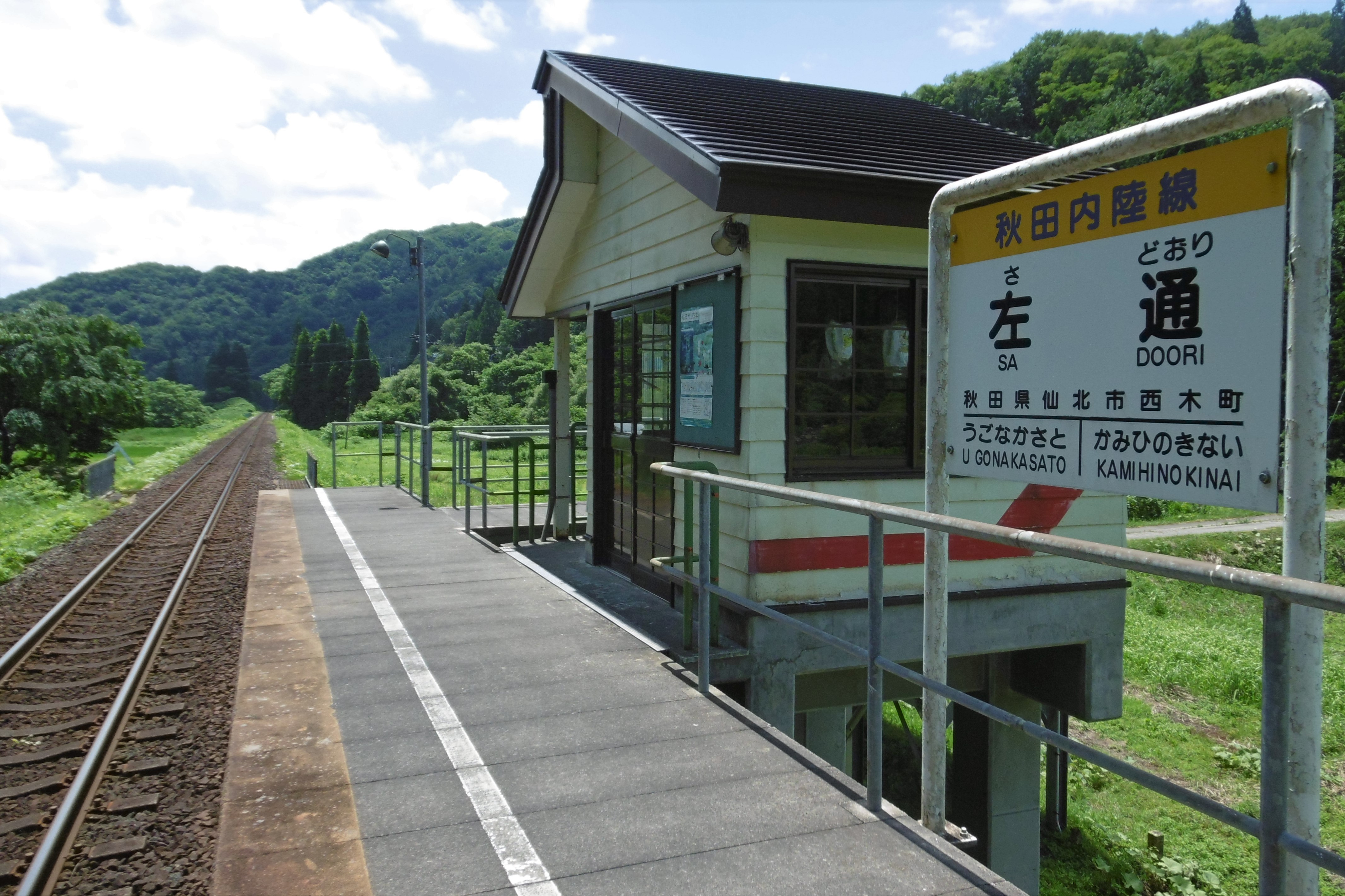 秋田内陸縦貫鉄道・左通駅：秋田県仙北市西木町